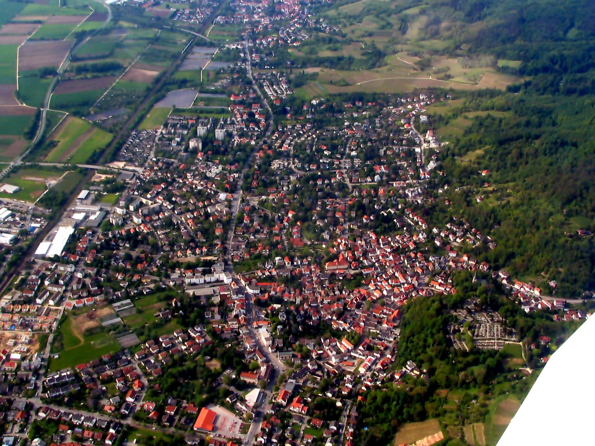 Luftaufnahme von Auerbach (16.05.2005)